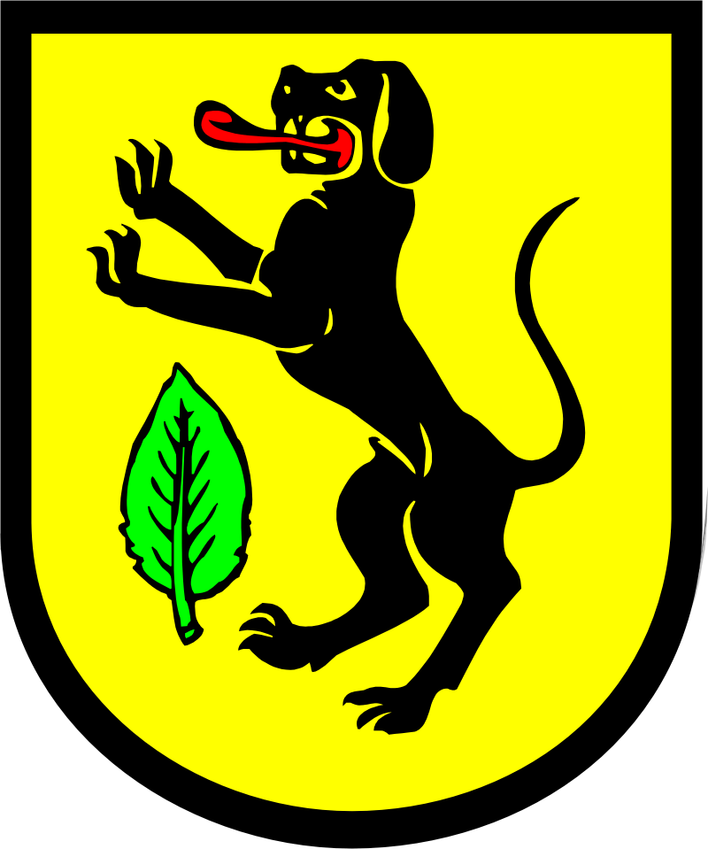 Wappen der ehemaligen Gemeinde Boke, heute Stadtteil von Delbrück